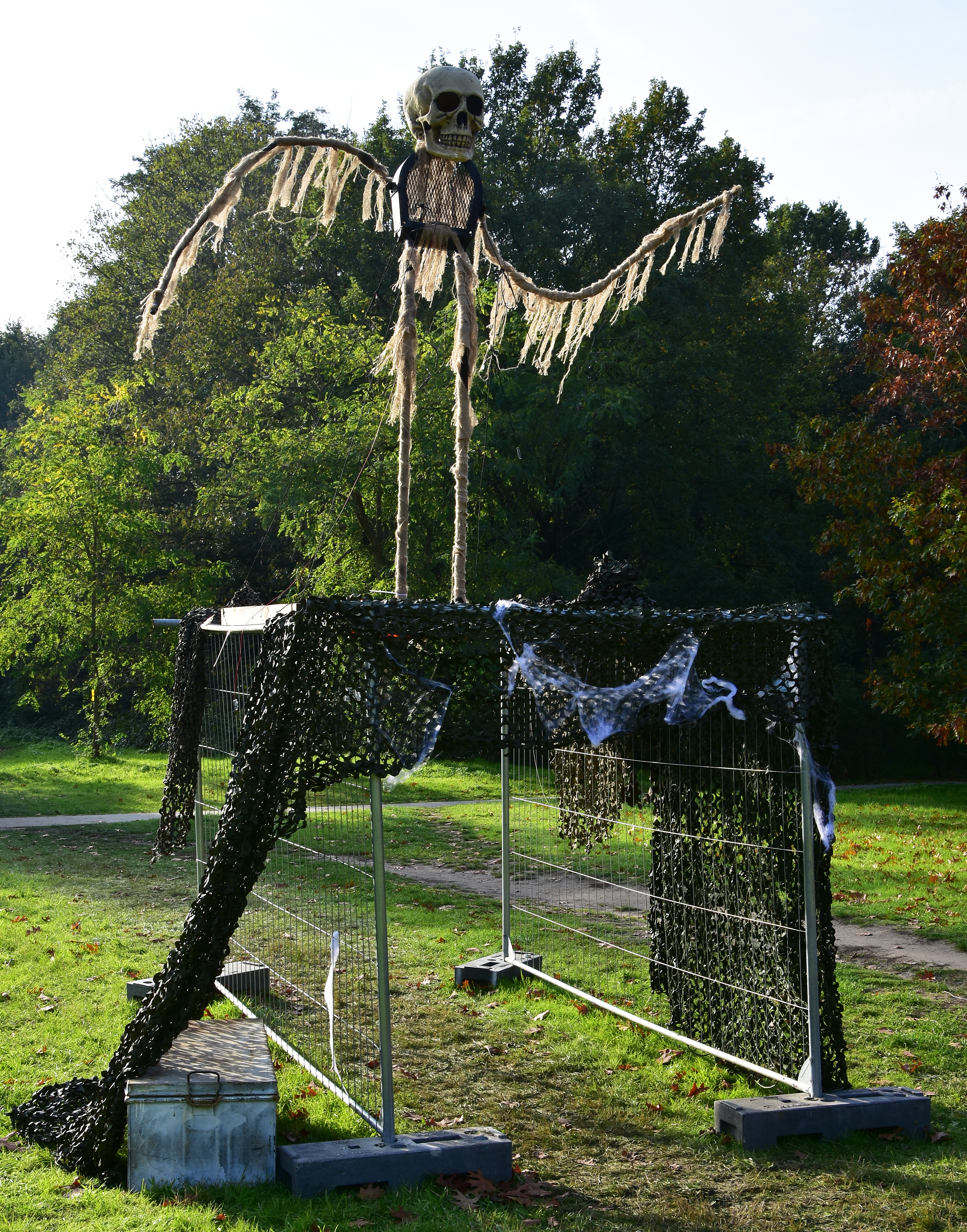 Halloween in Gentbrugge 31-10-2019 15-38-07 This photo of immaterial heritage has been taken in the Flemish Region